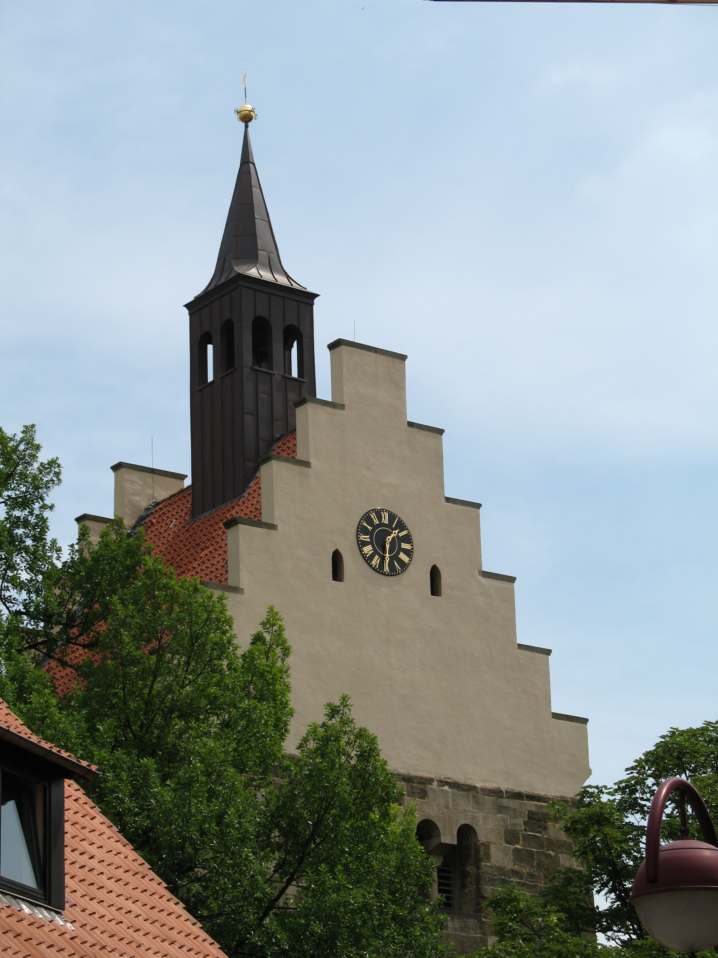 Margarethenkirche in Gehrden, Lower Saxony, Germany